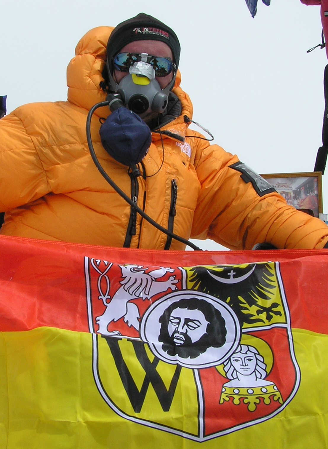 Bogusław Ogrodnik na szczycie Mount Everest